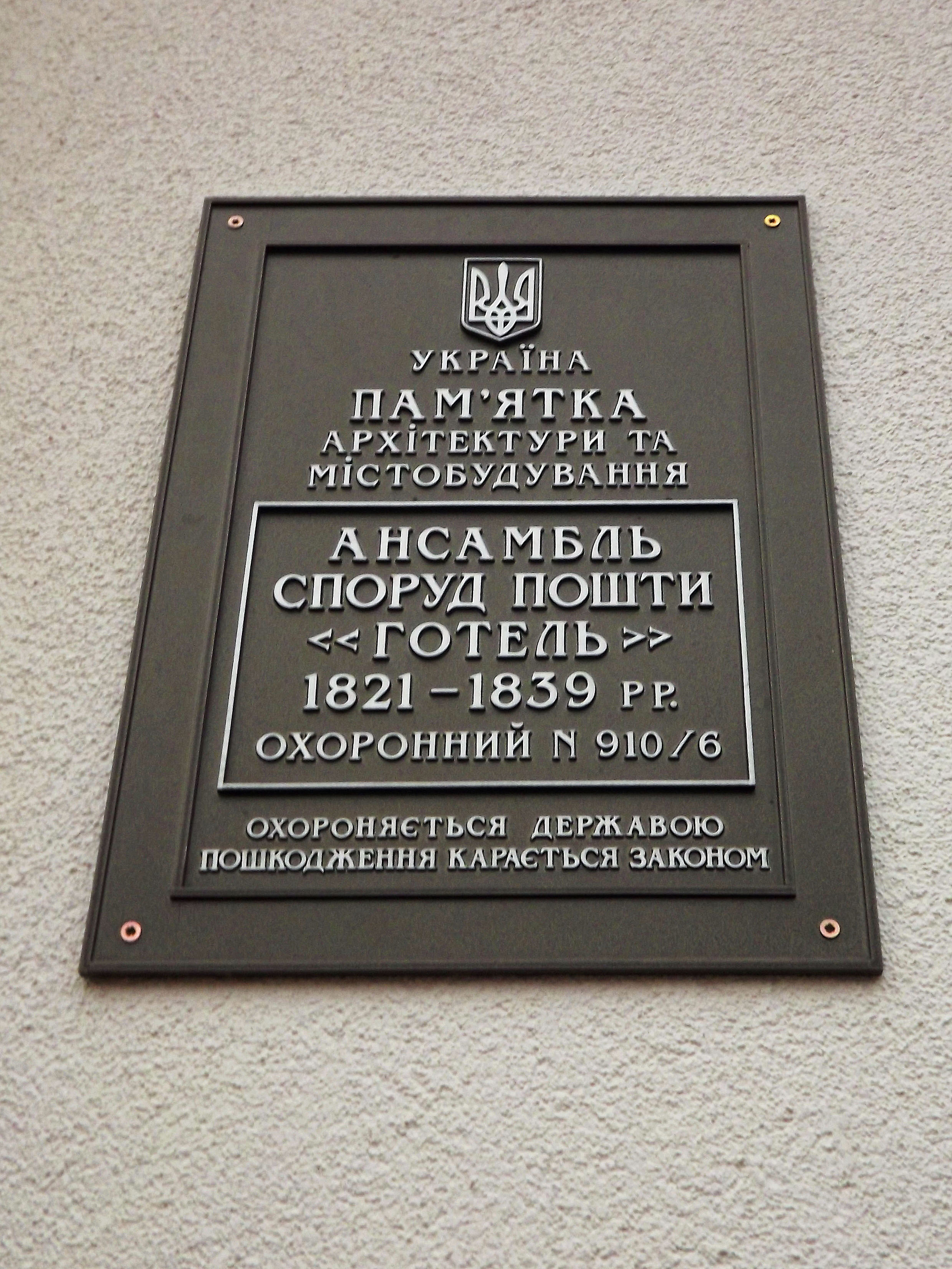 Готель (мур.), Біла Церква, Олександрійський бульвар, 41-45